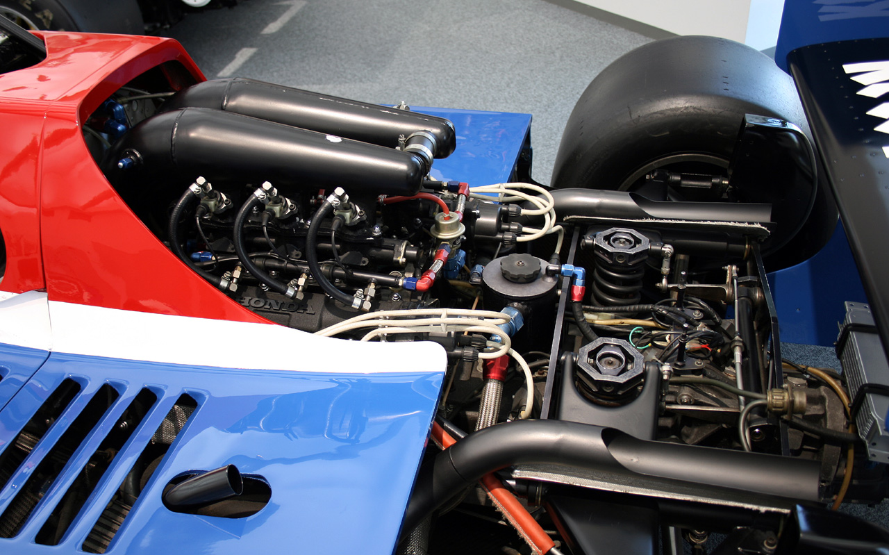 Honda RA163E engine (Formula One)